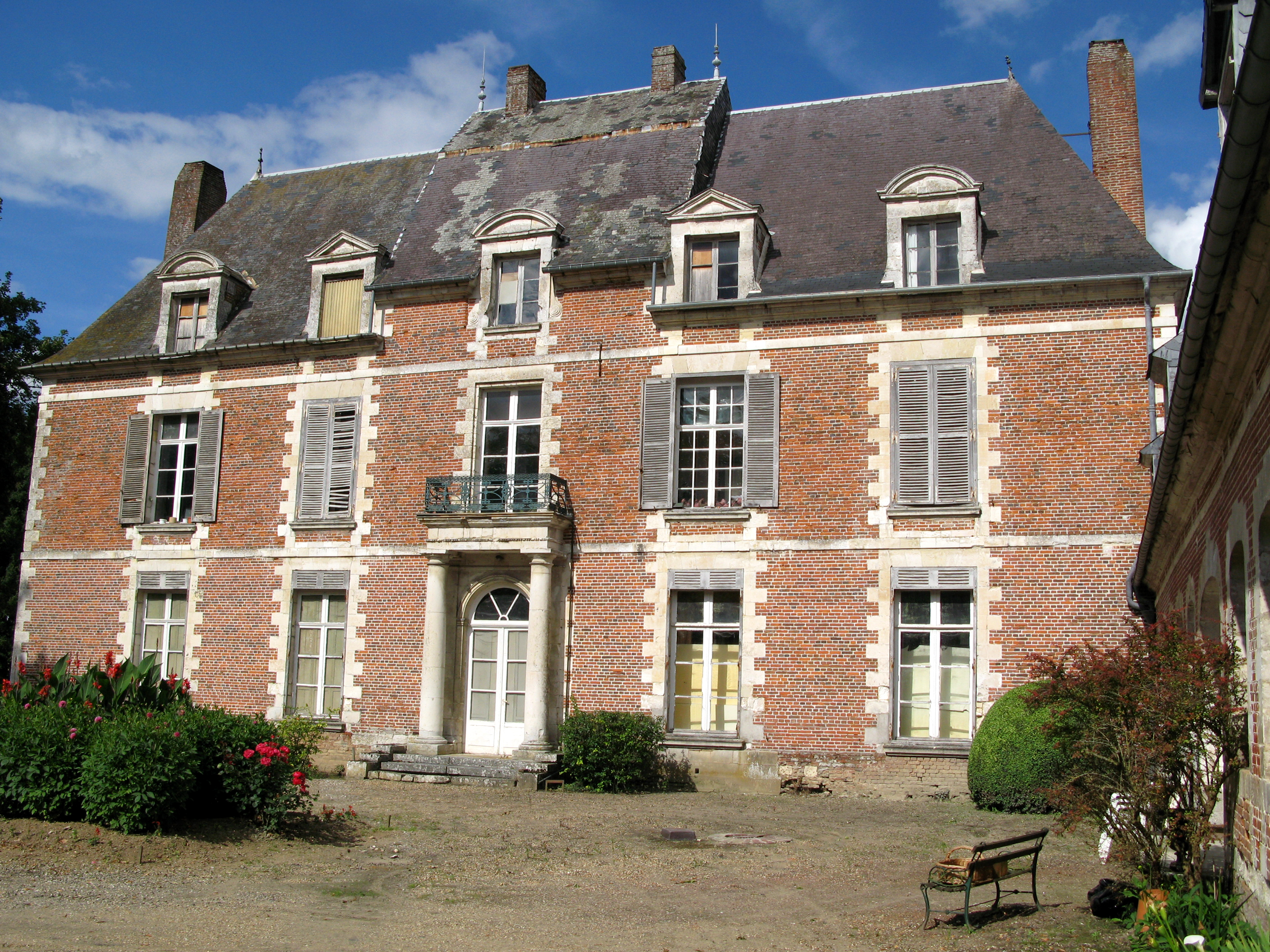 Quevauvillers (Somme, France) - Le château (façade donnant sur la place devant l'église, place du Jeu de Tamis et rue du Bois).